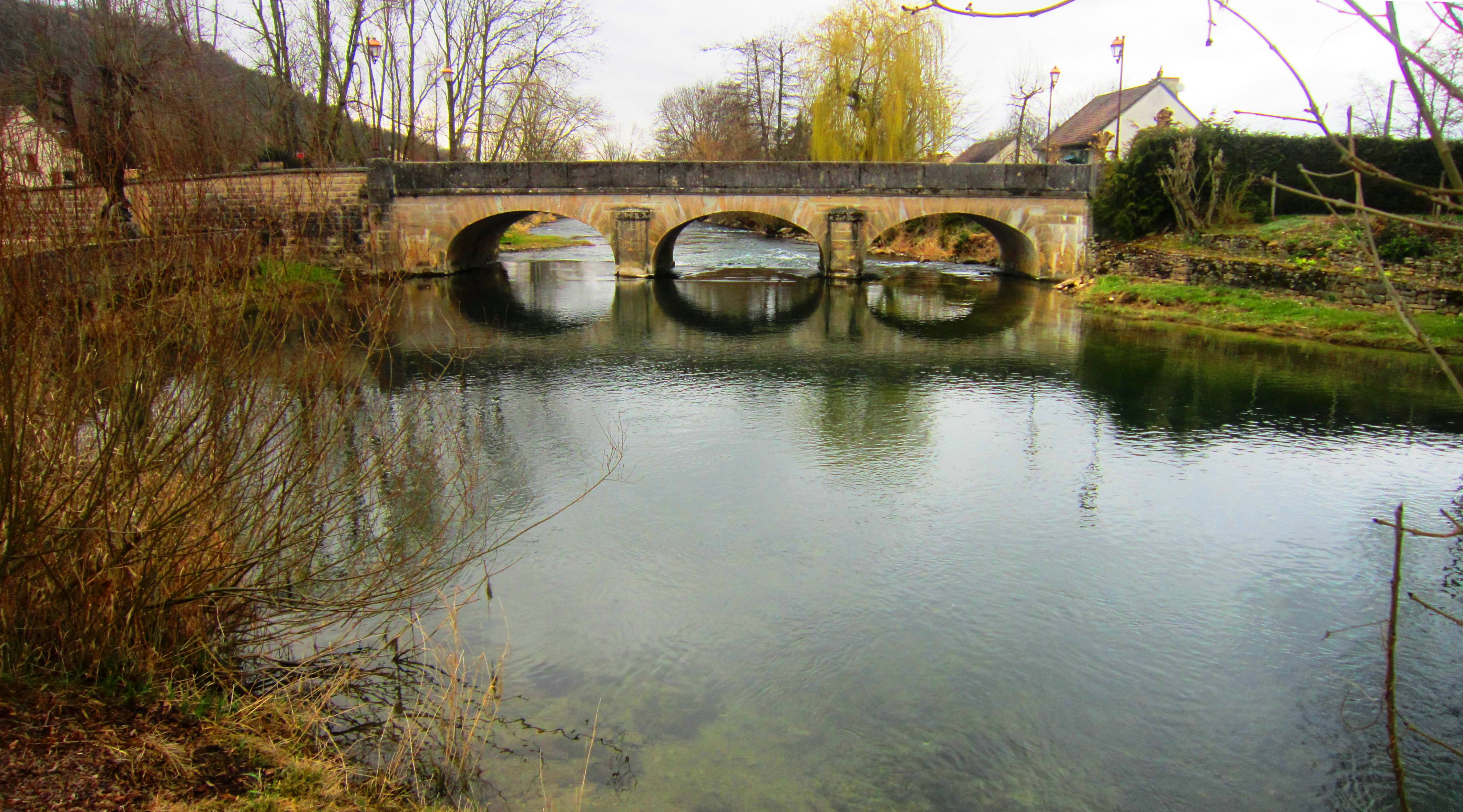 La Seine à Vix (Côte d'Or)